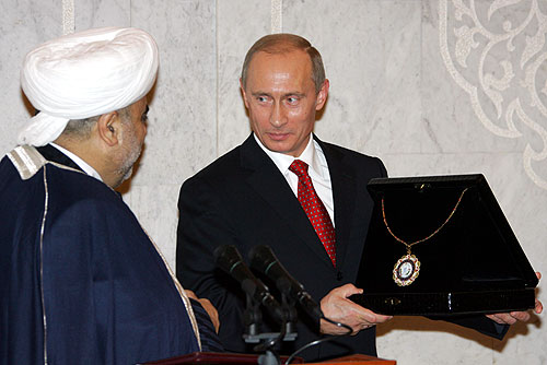 Визит в Азербайджан. Открытие Года России в Азербайджане